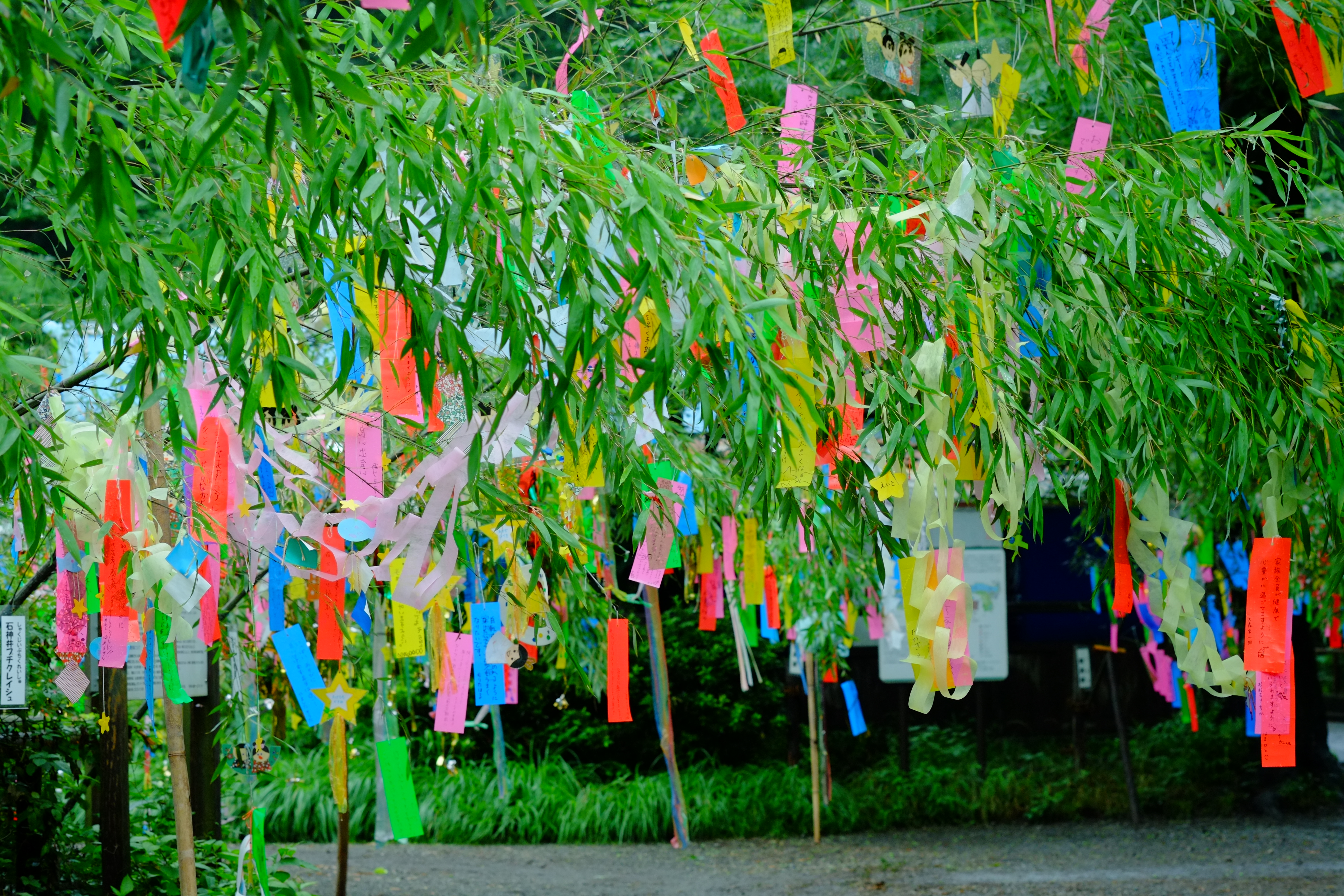 平日には大量の園児が短冊を飾って行ったり。 Tanabata - Tanzaku hanging on bamboo